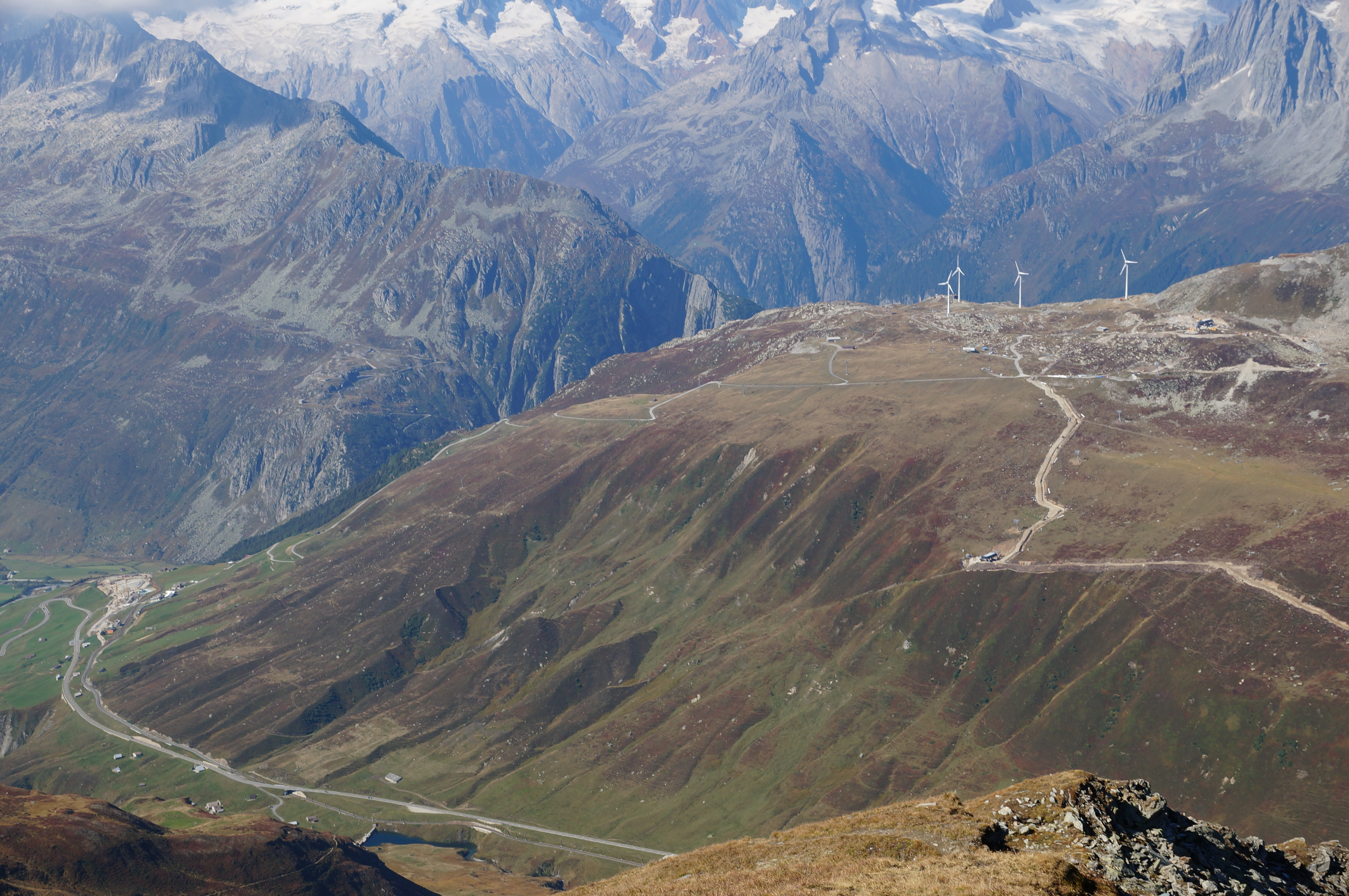 Nätschen oberhalb Andermatt vom Pazolastock gesehen